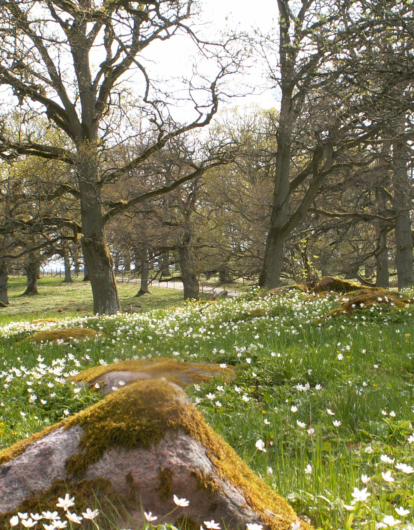 Bild av Brunsbo ängs naturreservat i Skara kommun, med dess höga ekar och vitsippsblommande fält.